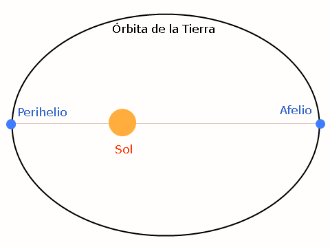 Esquema simplificado de la rotación de la Tierra alrededor del Sol, mostrando los puntos de afelio y perihelio.